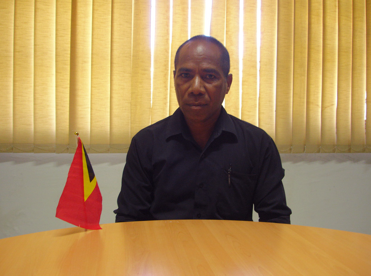 Joaninho da Costa Araújo, Administrator des Subdistrikts Hato-Udo